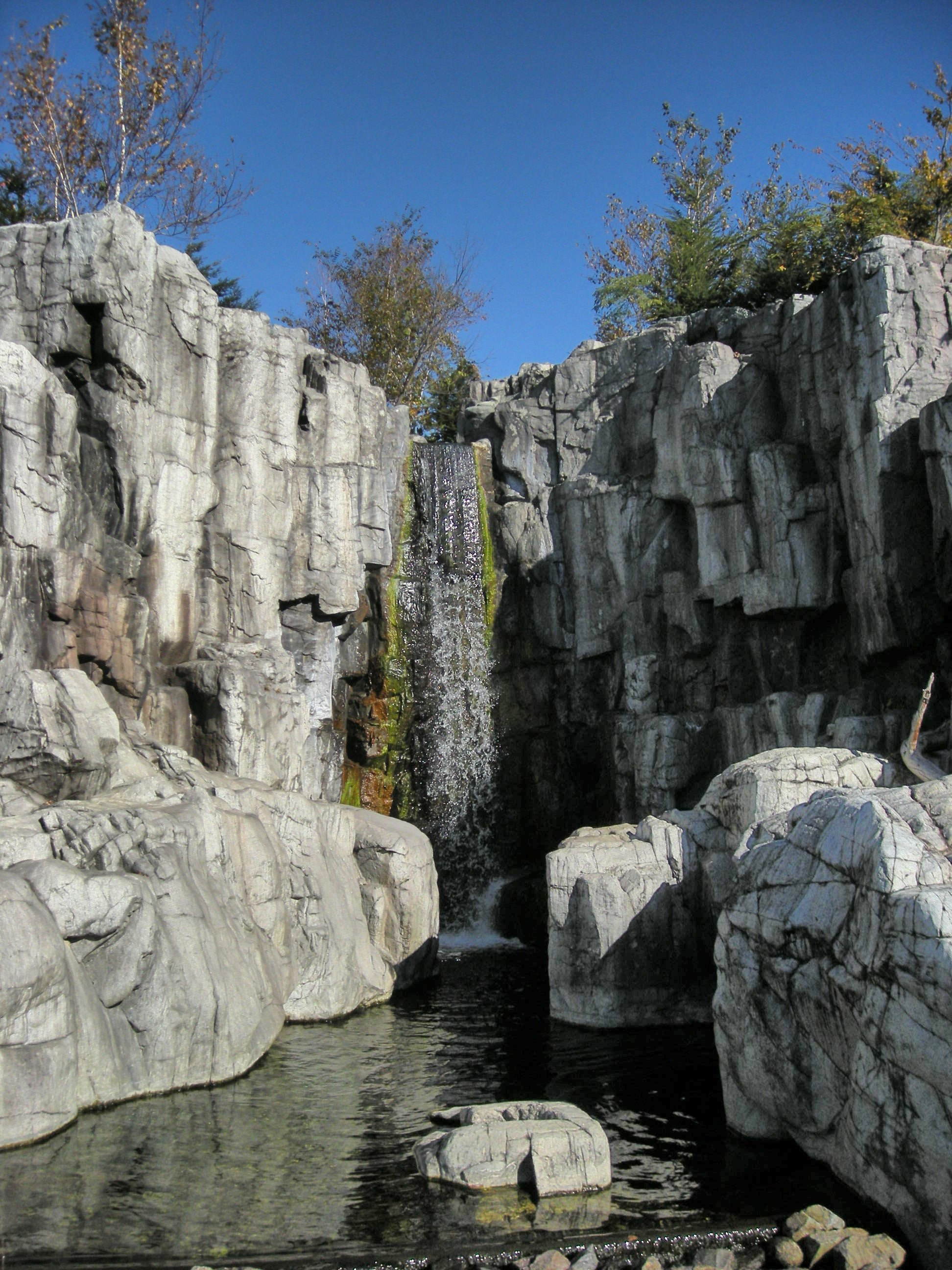 park of kisogawasuien（木曽川水園）